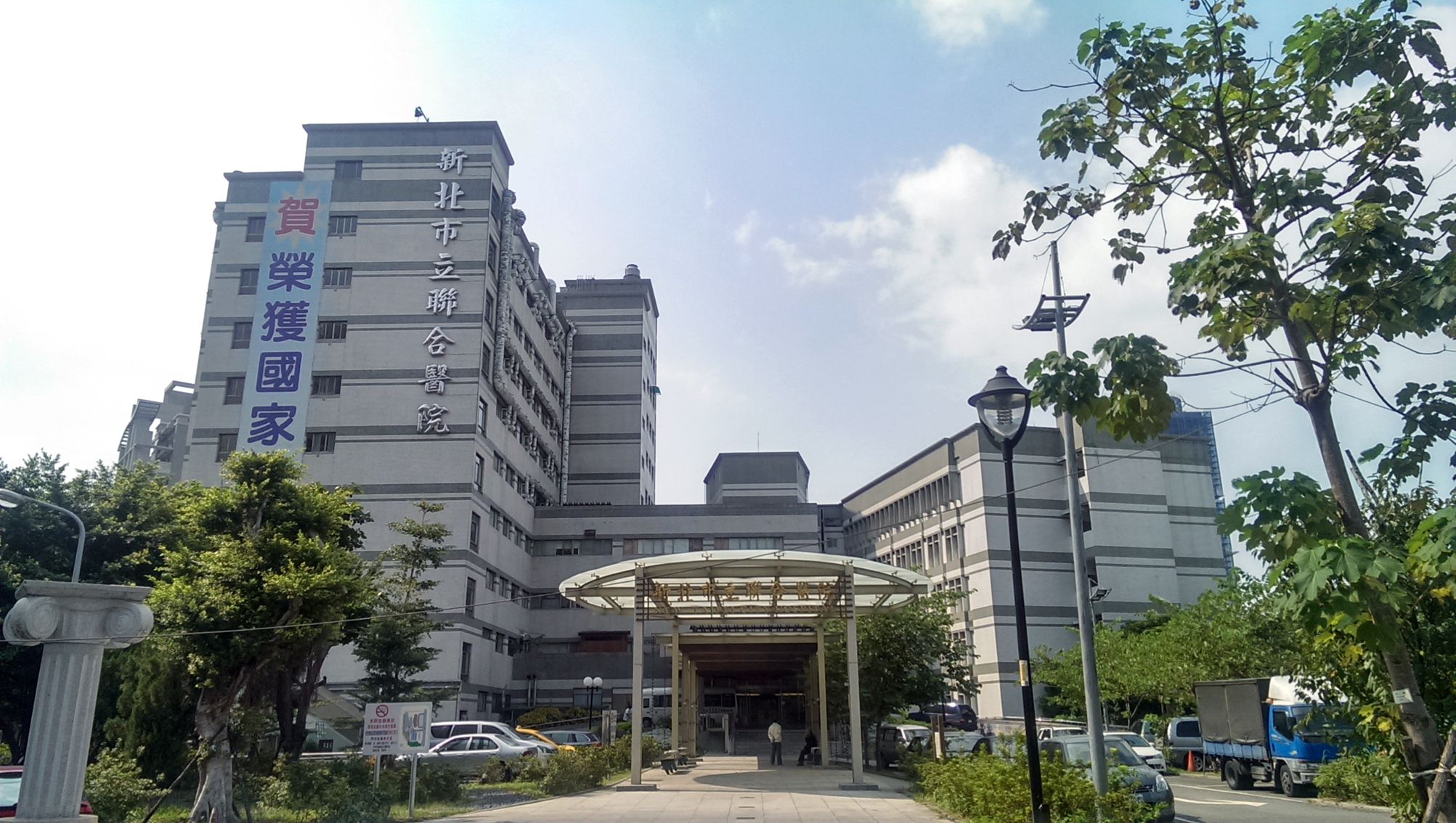 中文（台灣）: 從新北市三重區中山藝術公園仰望新北市立聯合醫院三重院區。